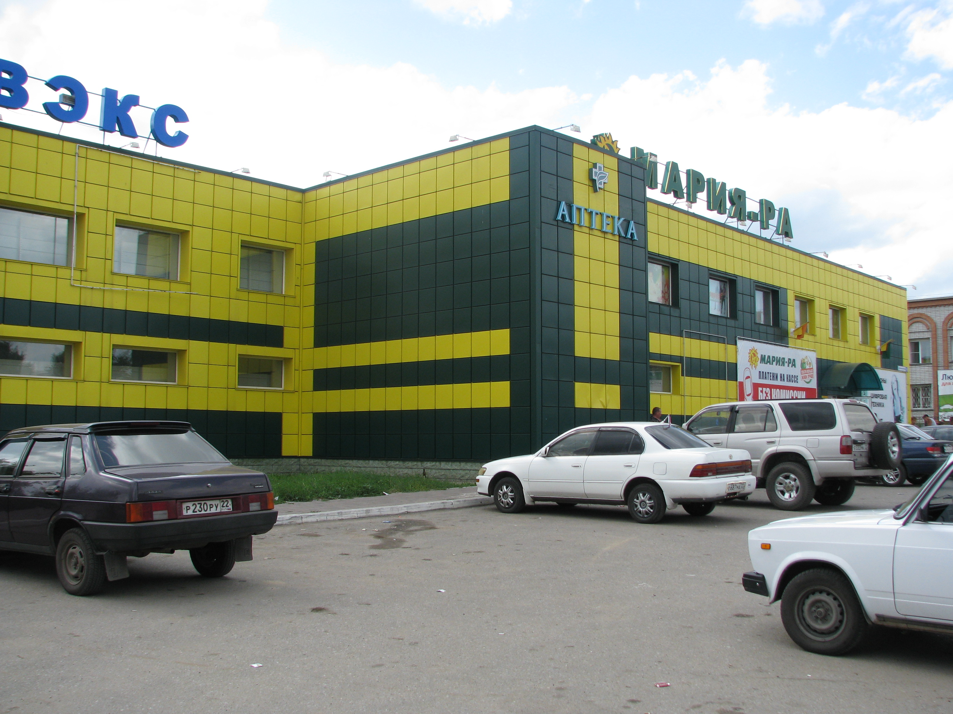 Торговый центр "Мария-Ра" в селе Поспелиха Алтайского края